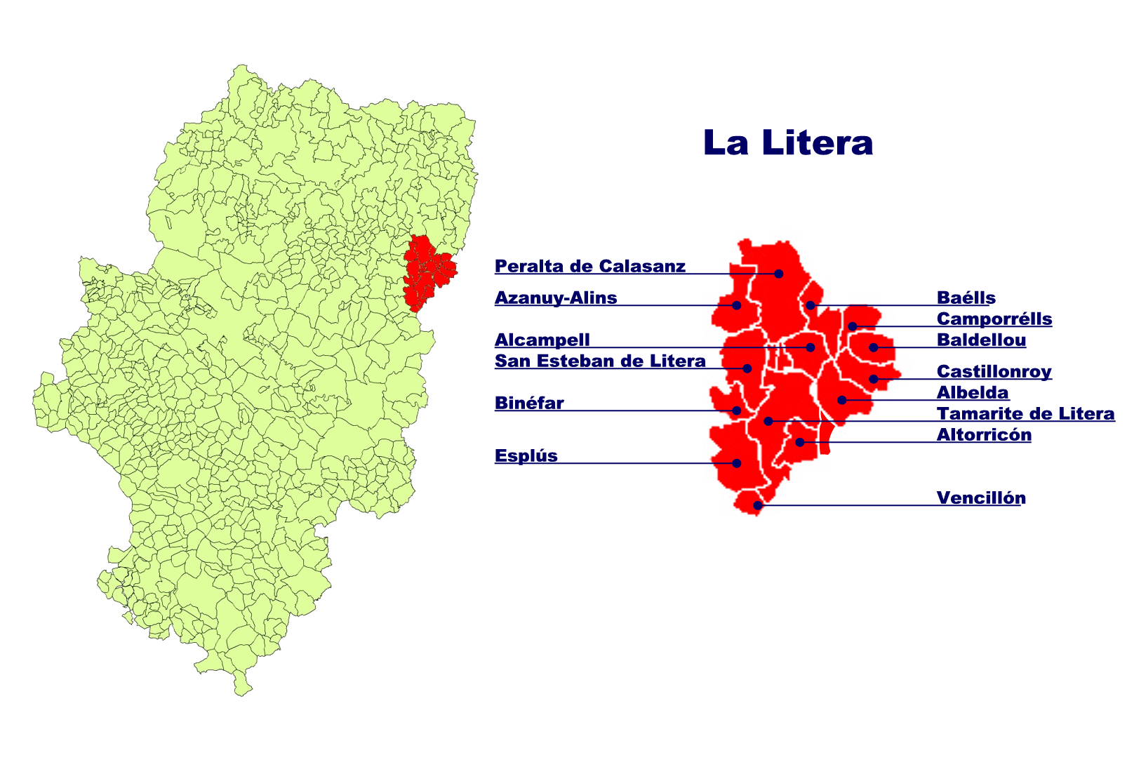 Comarca de la Jacetania